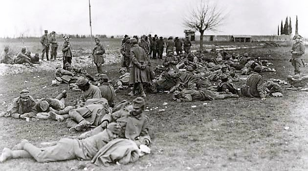 Avstro-ogrski vojaki v italijanskem ujetništvu